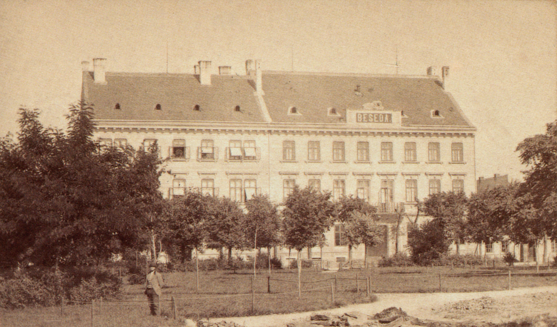 Budování Sadů před novostavbou Besedy.